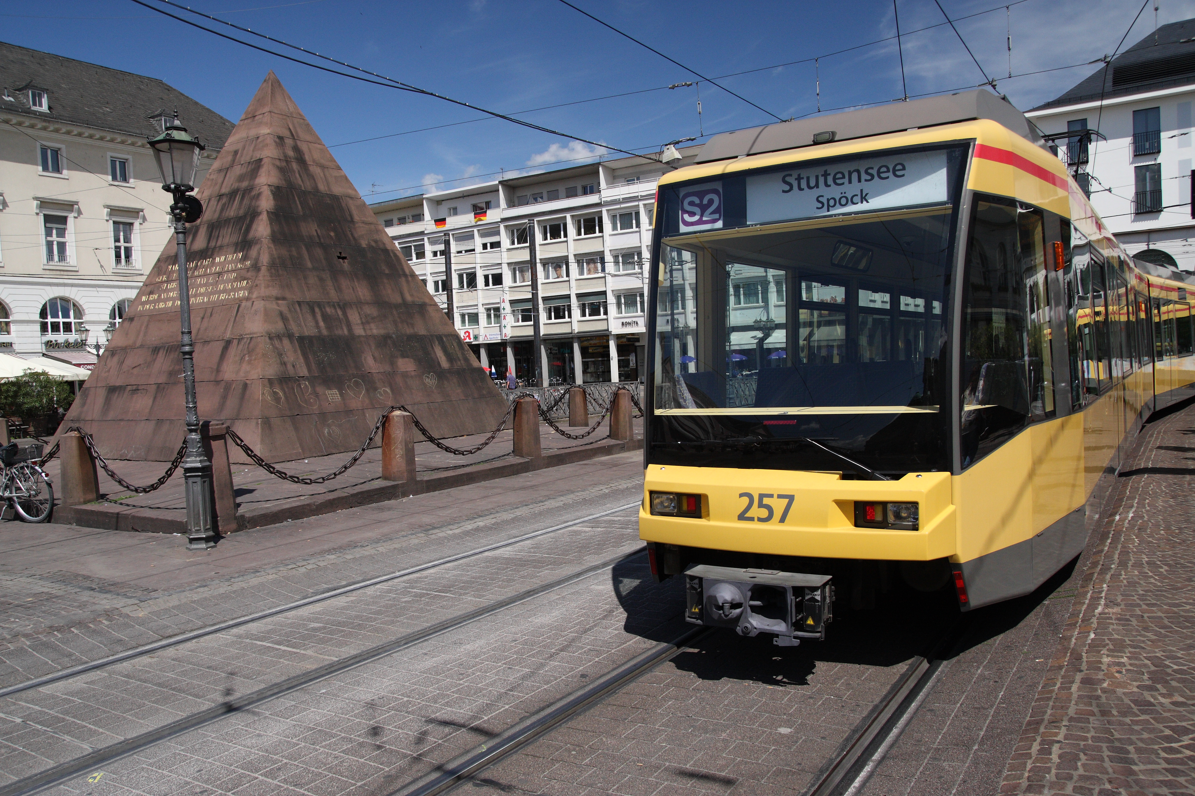 Karlsruhe, Germany